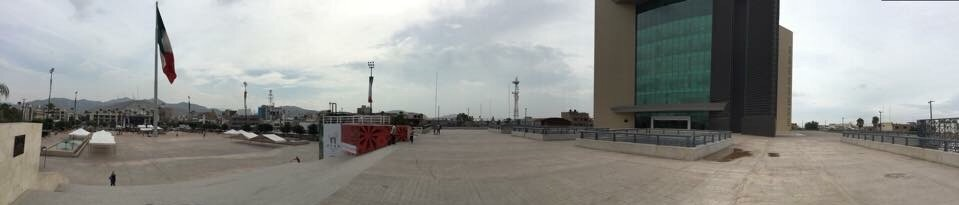 Foto panorámica de la Plaza Mayor desde la plataforma del edificio.